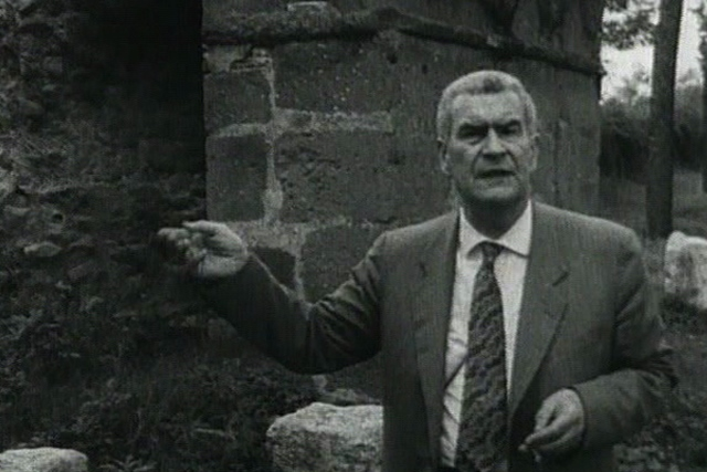 critico d'arte italiano